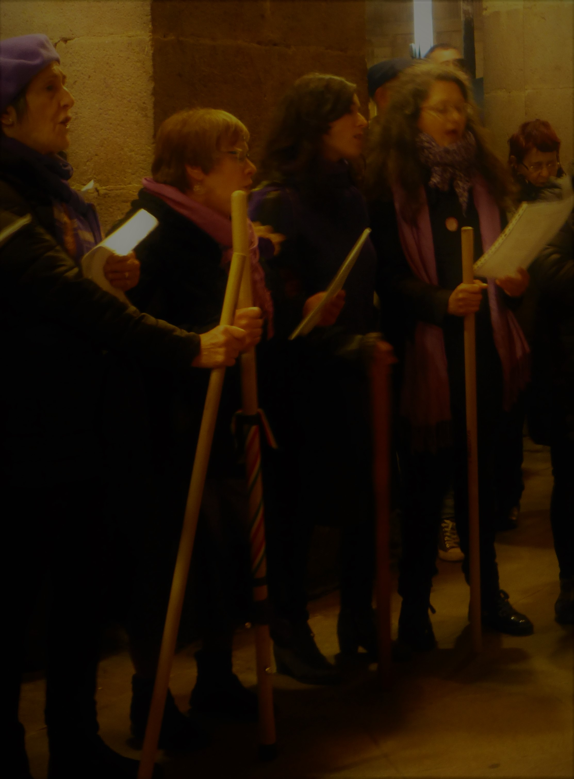 La Kora abesbatza Agate Deuna bezperan kopla feministak abesten.